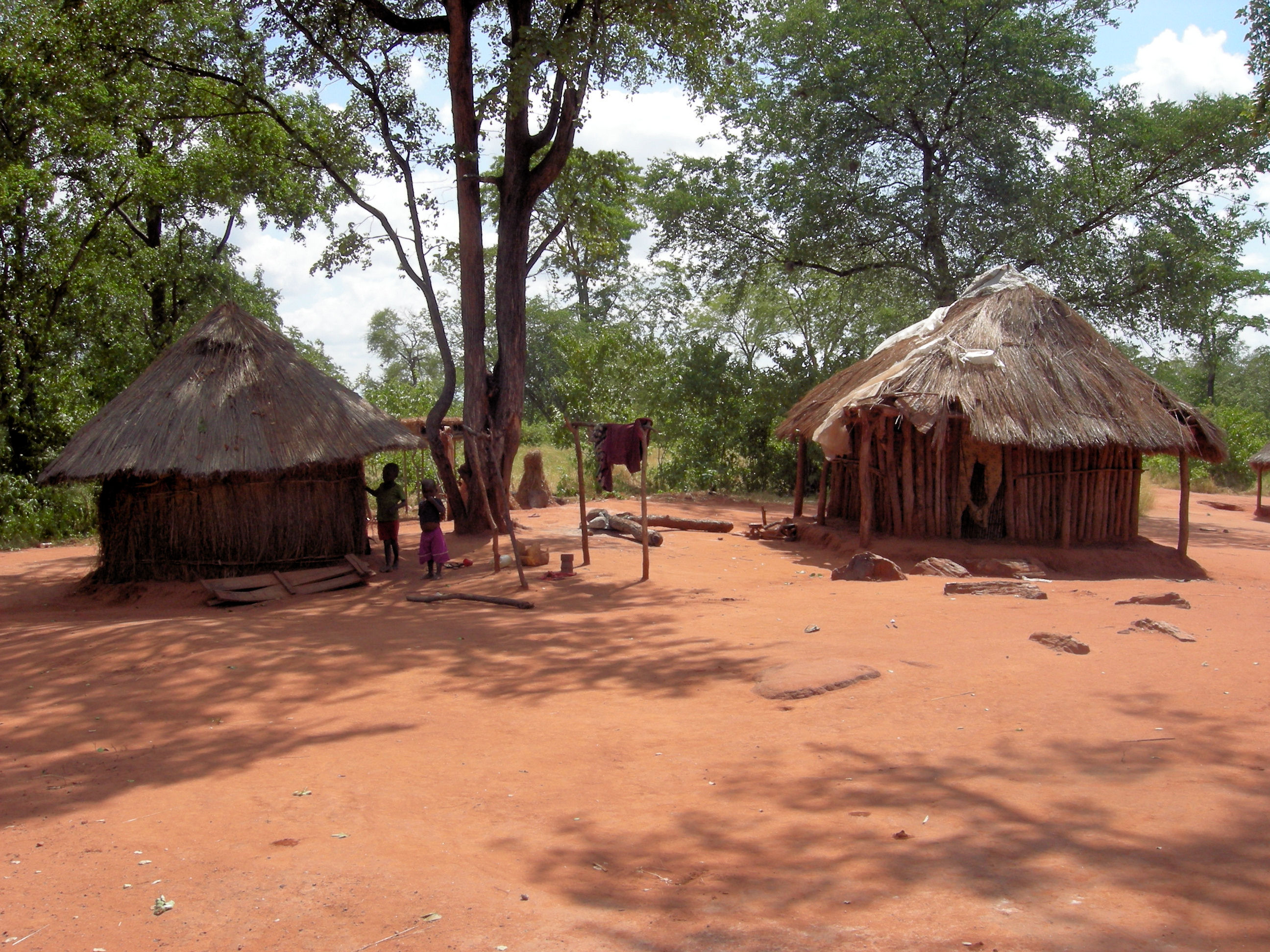 Zambian Village, Lower Zambezi